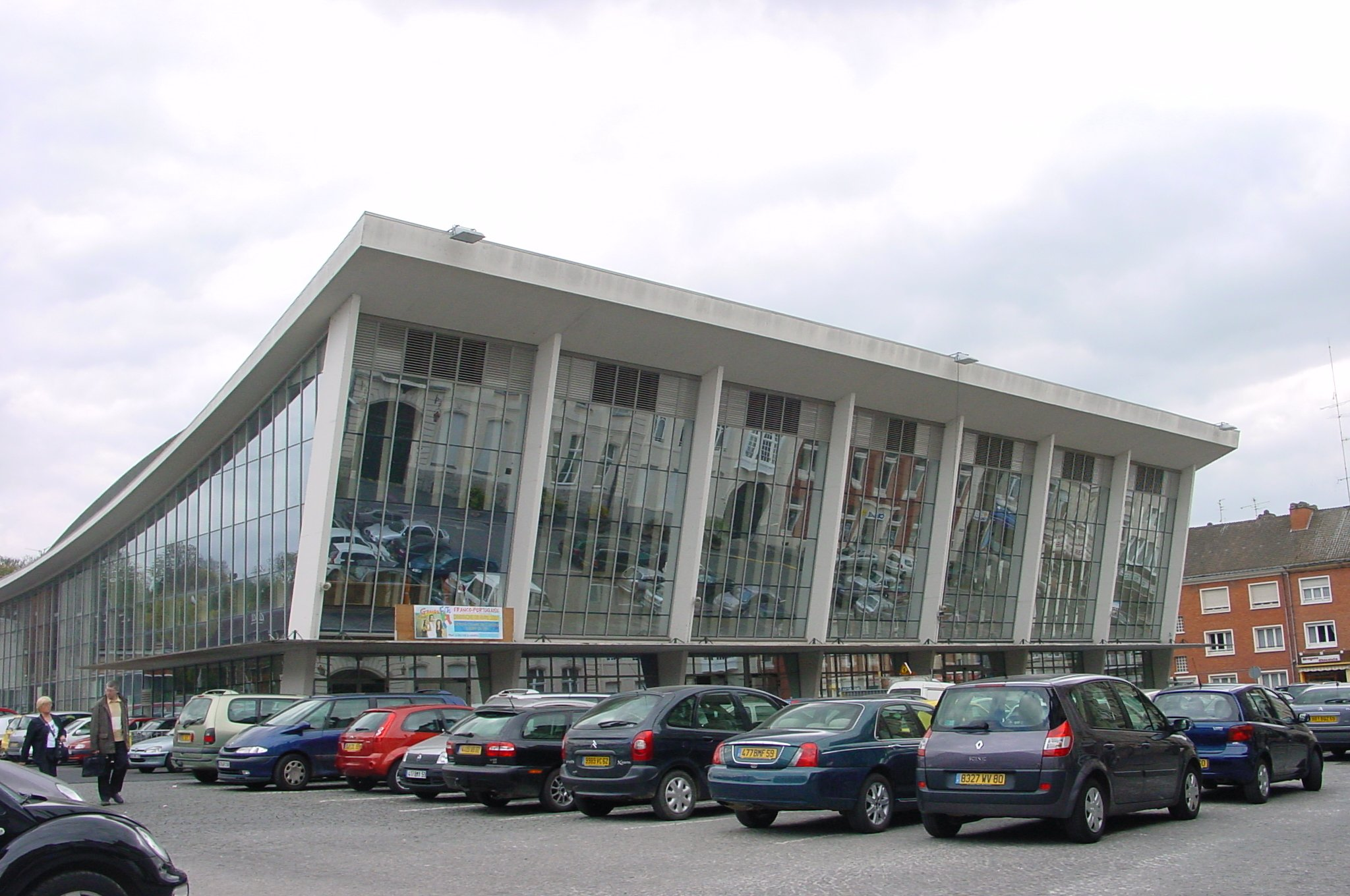 Marché couvert, Cambrai